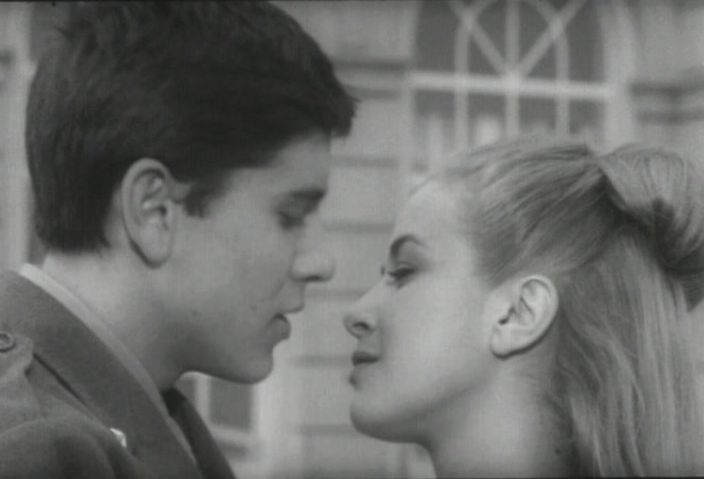 Gianni Morandi e Laura Efrikian in una scena del film In ginocchio da te (1964) Licensing 1964 1964